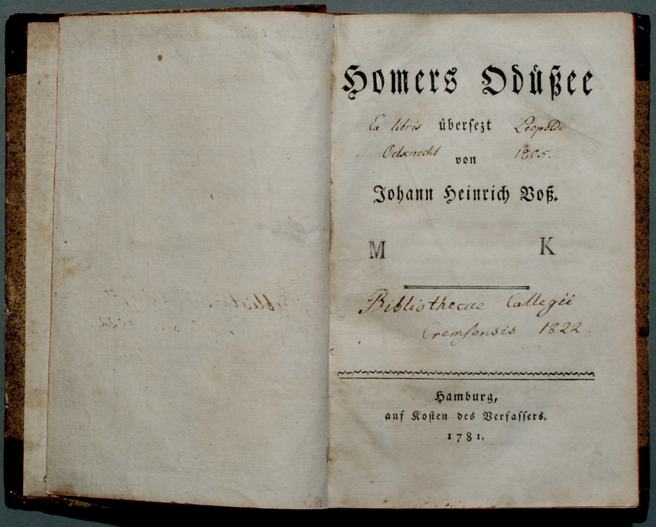 Voß, Johann Heinrich: Homers Odüßee [Odyssee] übersetzt von Johann Heinrich Voß. Hamburg, auf Kosten des Verfassers 1781, 468 Seiten + 8 nicht paginierte Blatt Subskribentenverzeichnis; Erstdruck, Wilpert/Gühring² 7